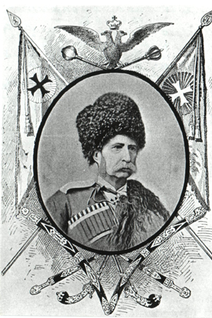 Наказний отаман Чорноморського Війська й український письменник Яків Кухаренко.